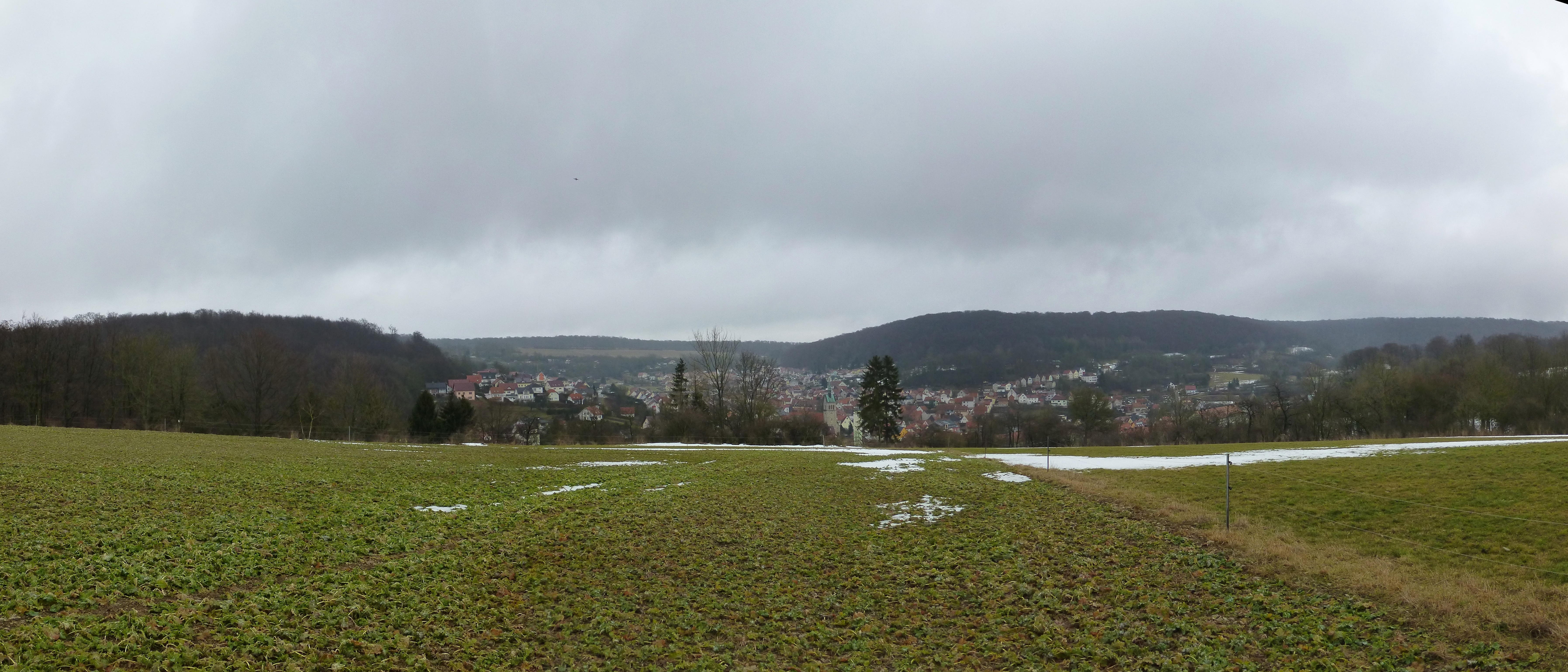 Panoramabild von Heyerode